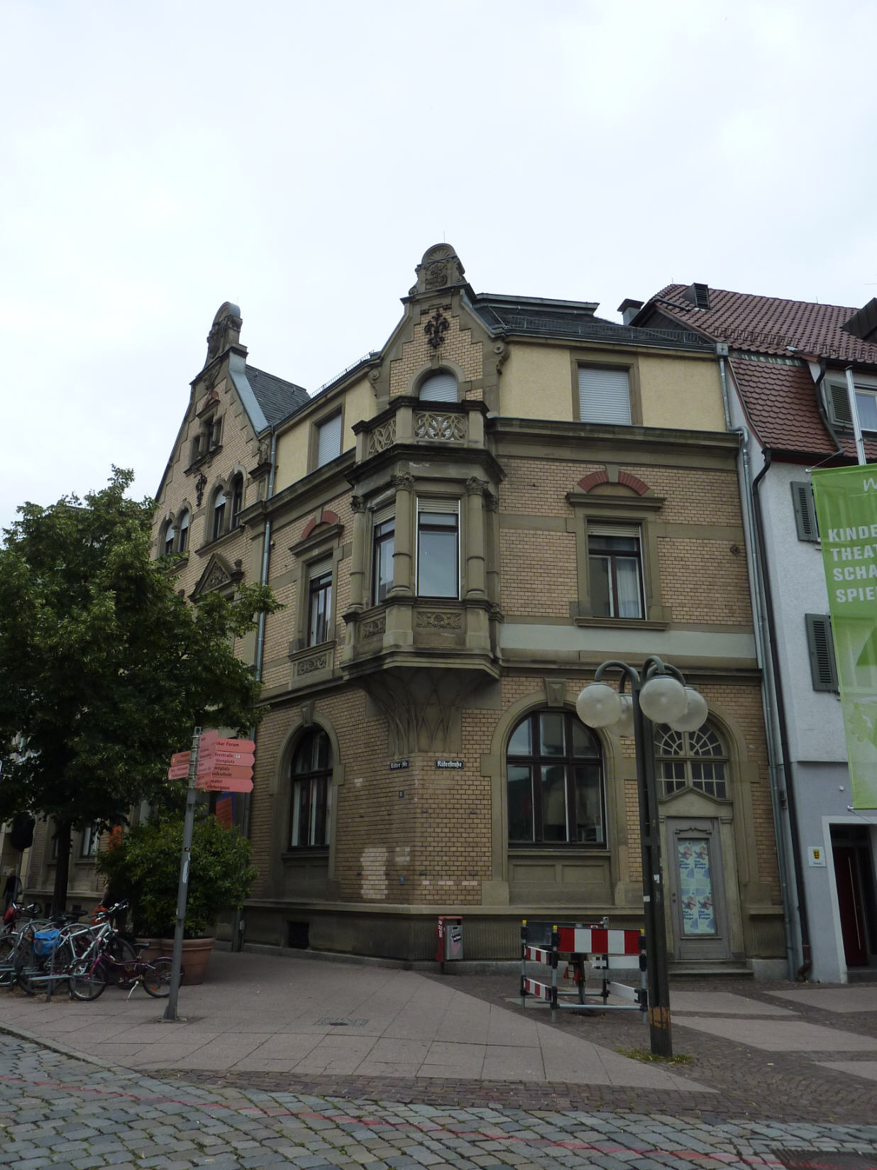 Ritterstraße 11 in Esslingen, 1898/99 von Hermann Falch erbaut